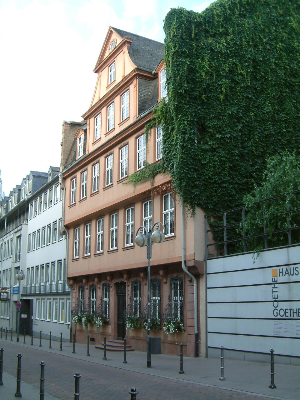 Goethehaus, Grosser Hirschgraben, Frankfurt am Main Photo: Joachim Hensel-Losch